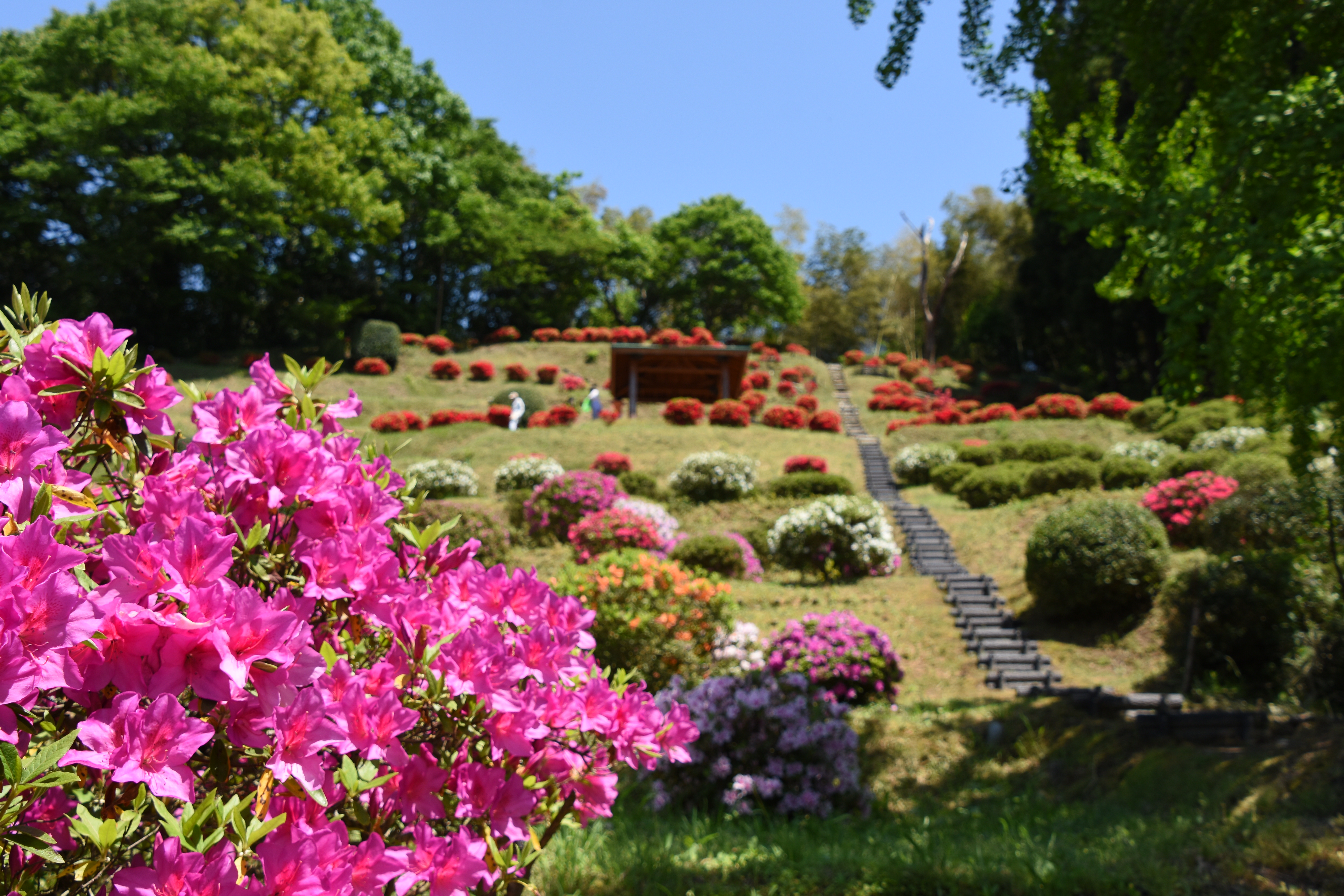 さつき山公園 新潟市秋葉区 2015年5月5日撮影